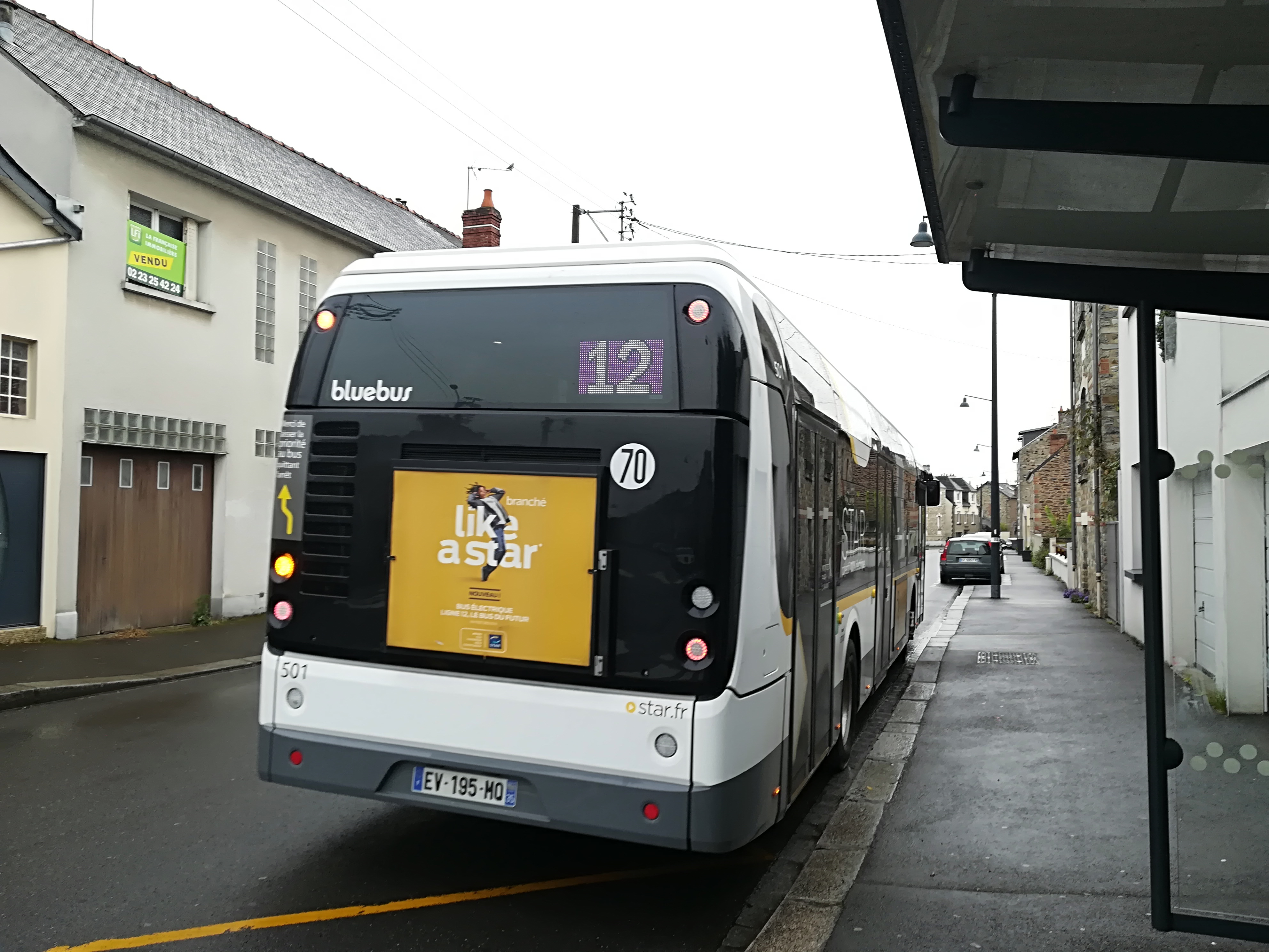 Bus électrique de la ligne 12 du réseau STAR.